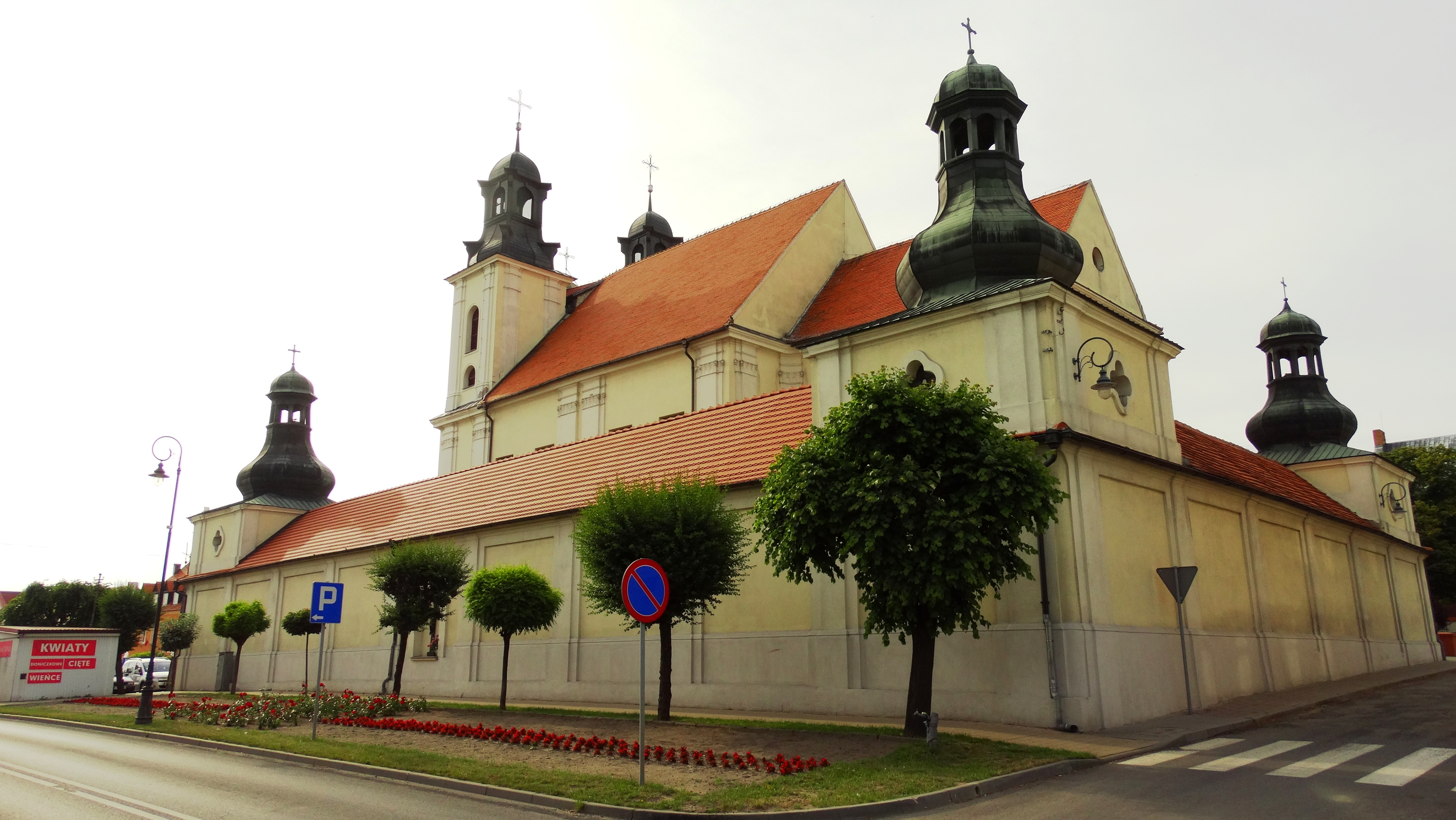 Kcynia, kościół pw. Wniebowzięcia Najświętszej Maryi Panny, 2 poł. XVIII